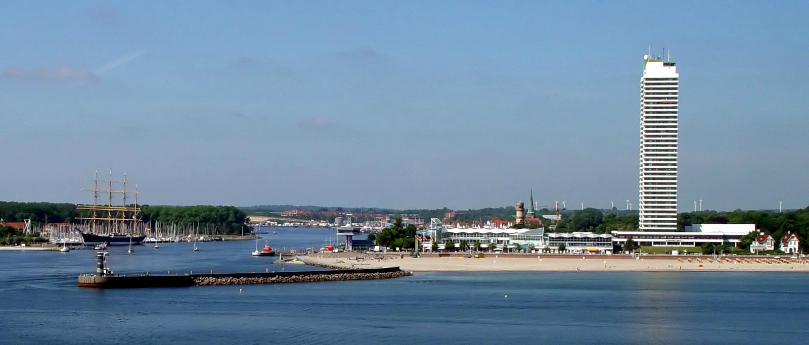 Hafeneinfahrt Travemünde mit Passat im Segelhafen Priwall, Lotsenstation, Leuchtturm, St.-Lorenz-Kirchturm, Hotel Maritim.